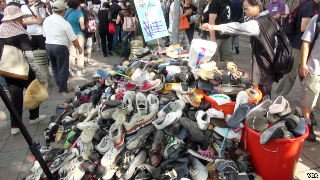 臺灣公民投入全國關廠工人連線發起的萬人威鞋(脅)馬英九「惡質豺狼政府，人民加倍奉還」。諷刺的是，2017年2月24日，國道收費員自救會與桃園市空服員職業工會聯合舉行「反搭便車反打壓大遊行」，群眾從勞動部走向總統府，將菜市場不要的爛菜丟向總統府，批評蔡英文是「人前風光給承諾，人後陰狠捅一刀」的「爛蔡」。